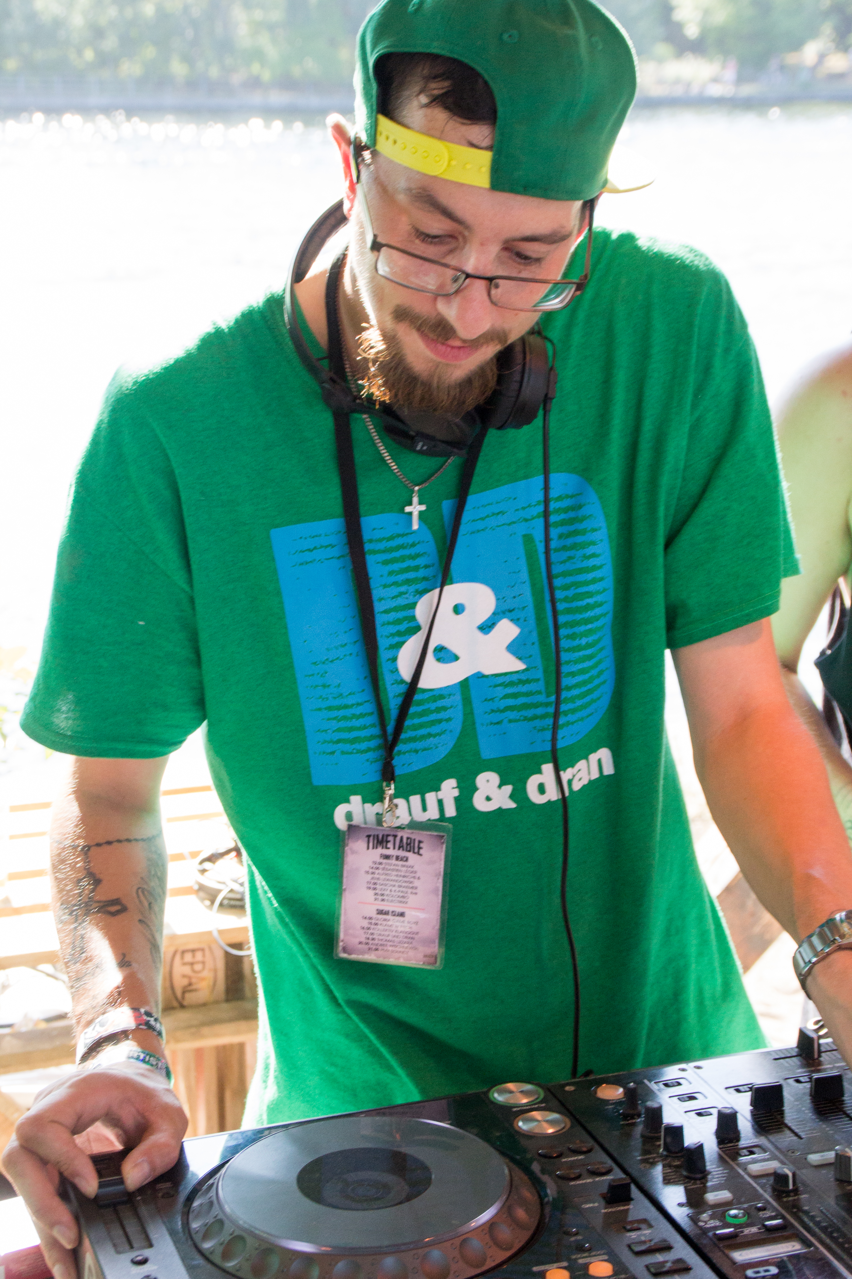 Drauf und Dran - Dieses Bild ist auf dem Sterne & Bass Tages-Festivals vom 9. August 2015 das in Berlin-Rummelsburg entstanden.